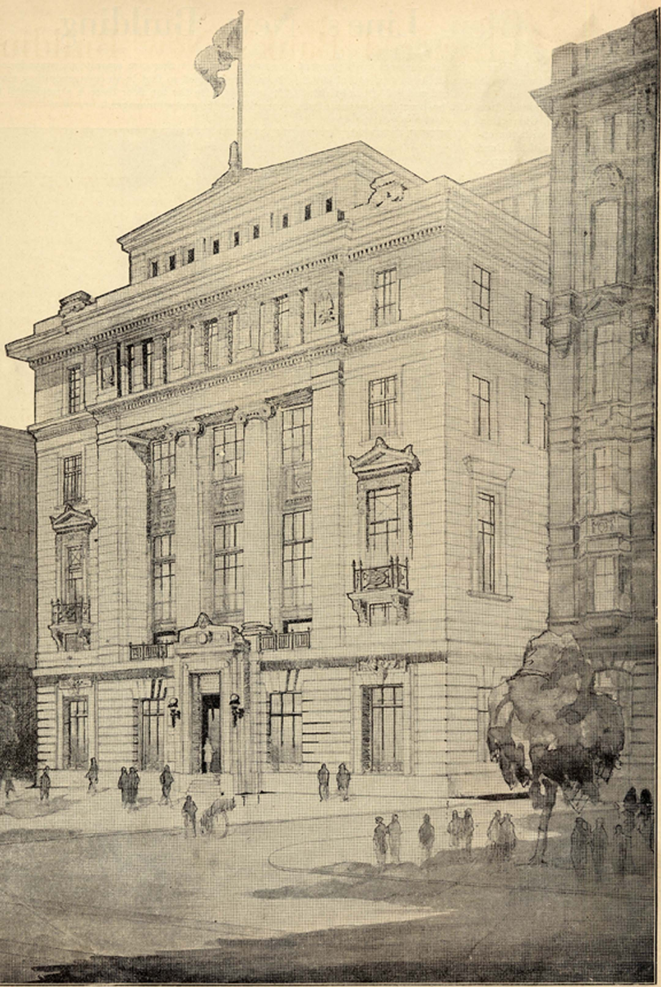 中文（中国大陆）: 原麦加利银行外观